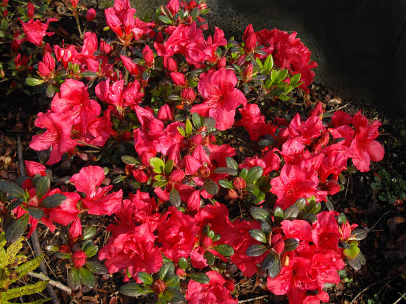 Rhododendron 'Johna'